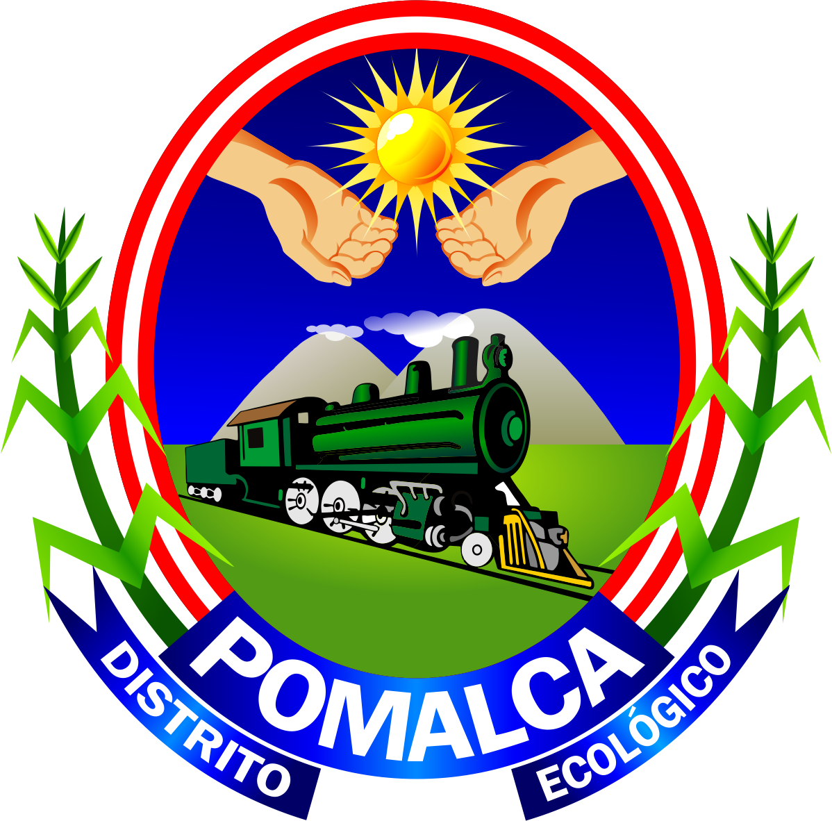 Distrito de Pomalca - Provincia de Chiclayo - Región Lambayeque